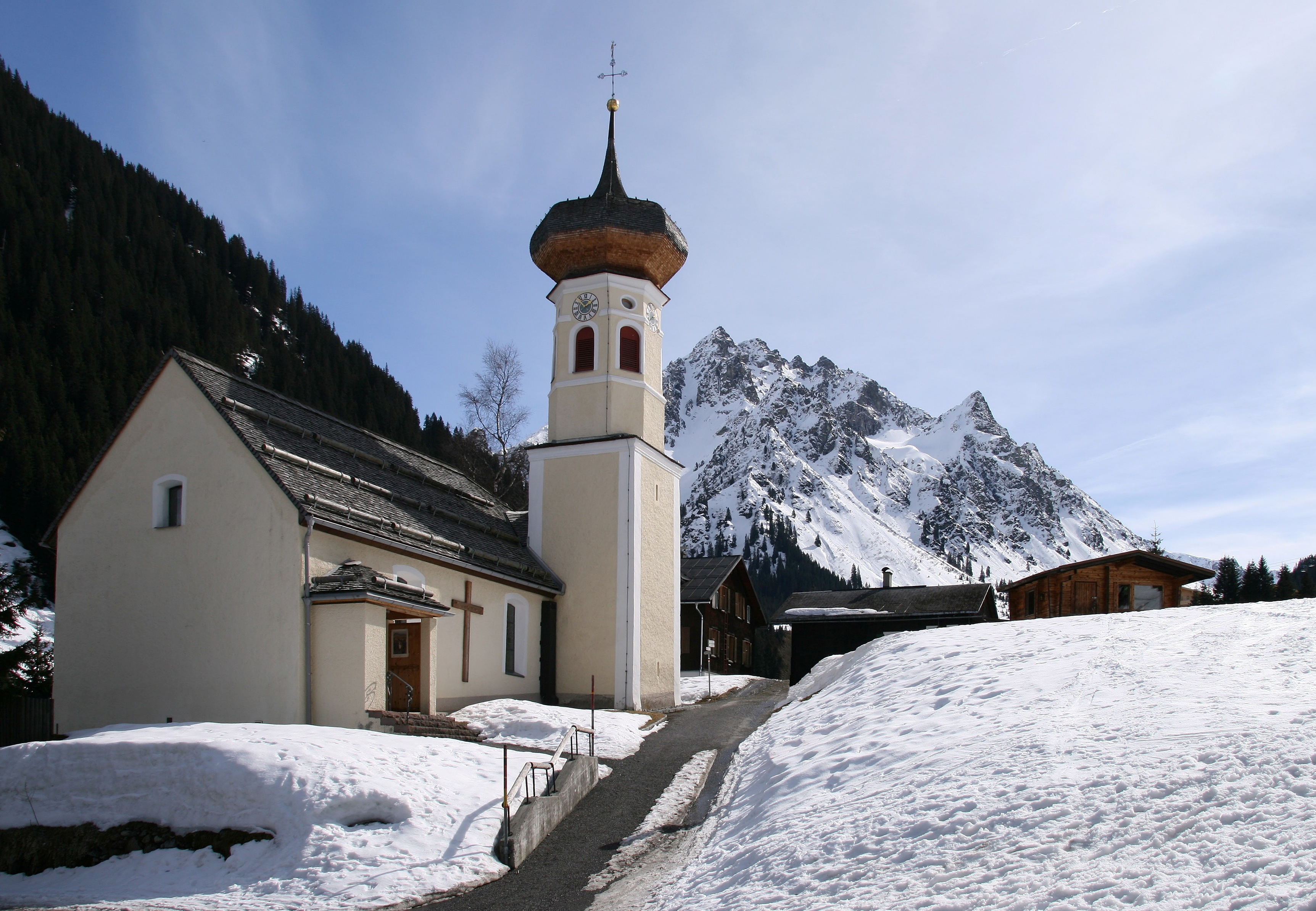 Kuratienkirche hl. Maria Magdalena, in Gargellen, Vorarlberg von Nordosten mit Ritzenspitzen im Hintergrund